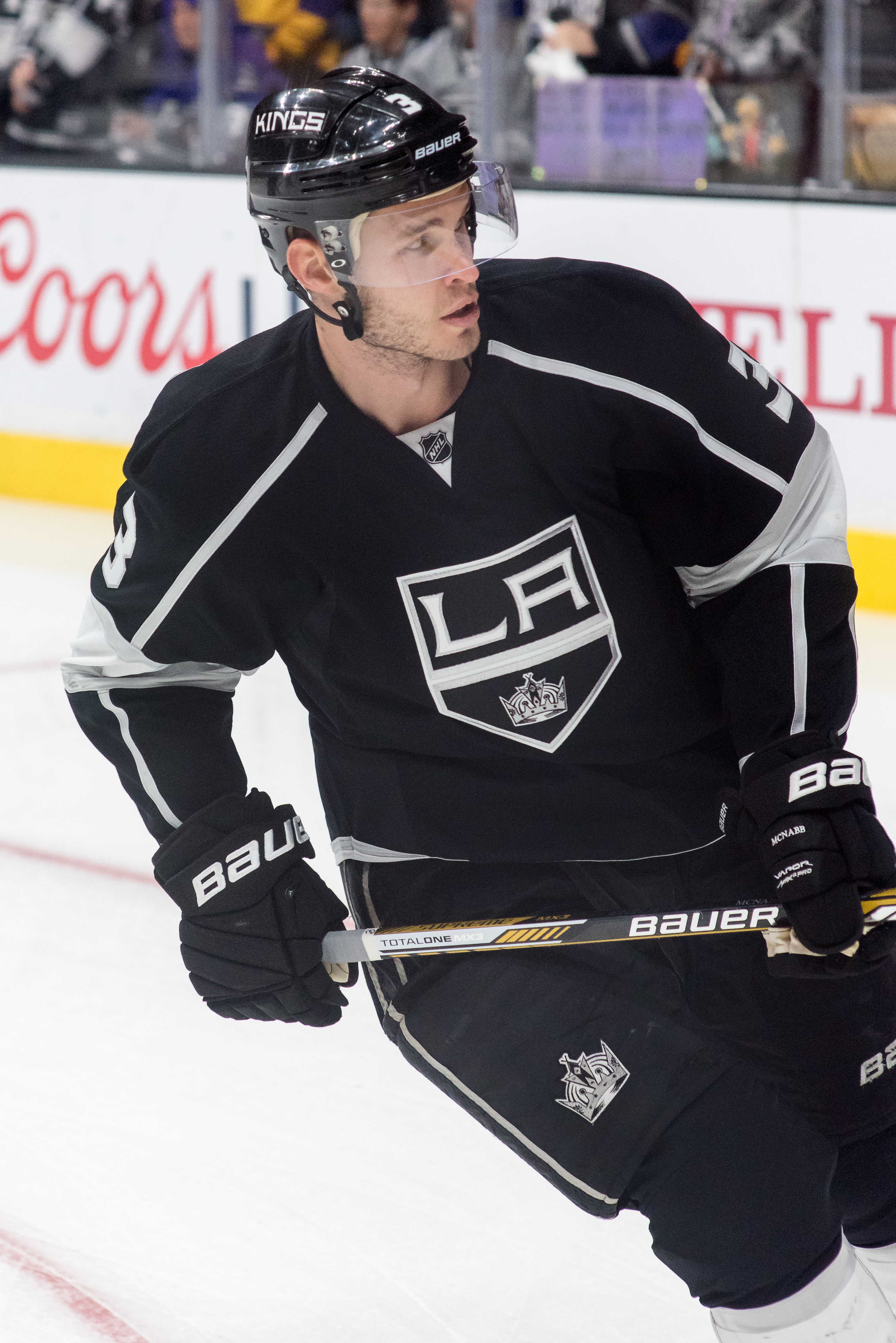 Brayden McNabb